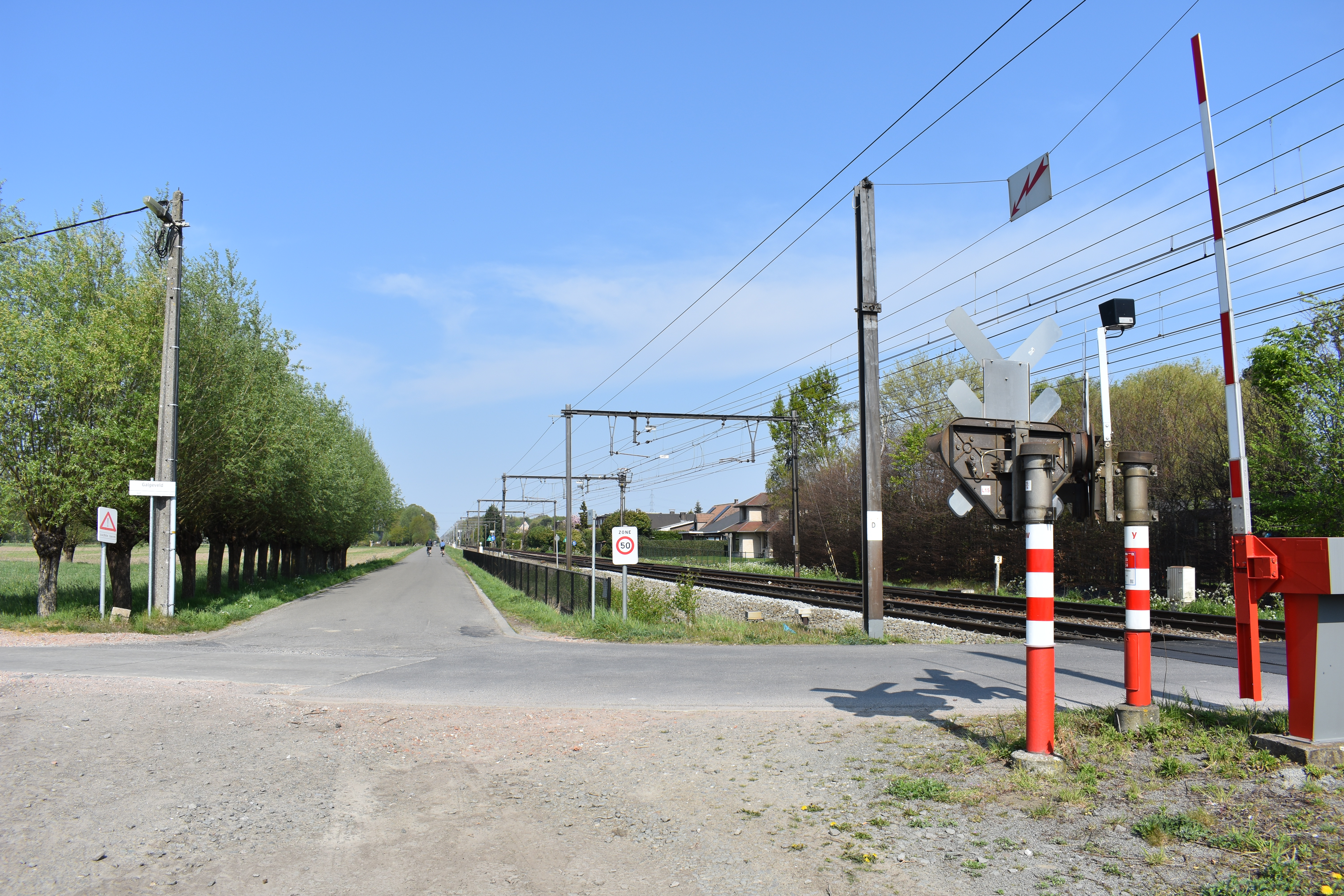 Fietssnelweg F11 Antwerpen-Mortsel-Boechout-Lier. In maart 2020, voorlopig einde van fietsroute F11, aan overweg 14, op de hoek van Galgeveld en Hockeyweg te Lier